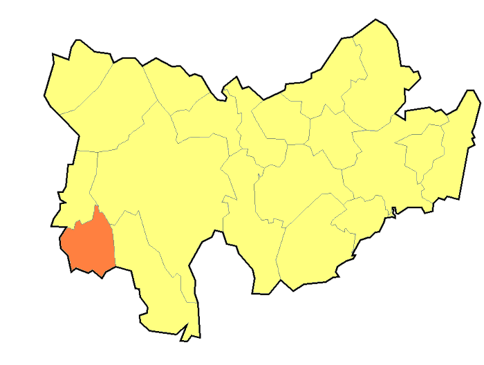 Hranice Rašovice (Vyškov-(Bučovice)- czech republic)